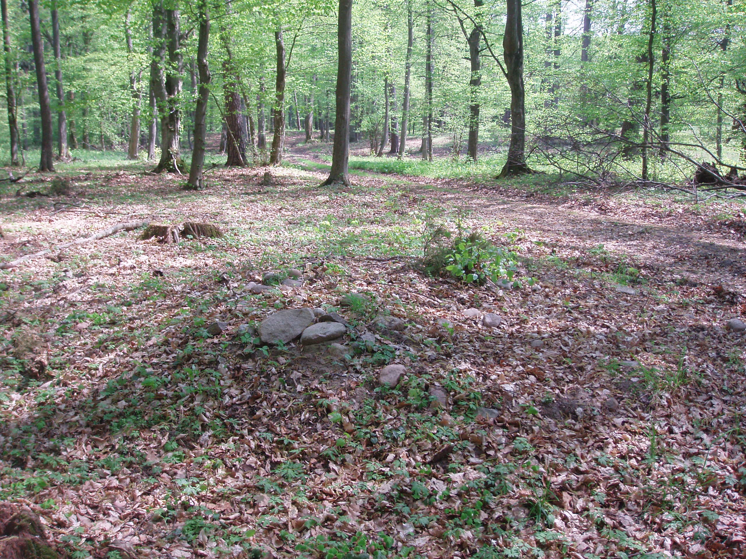 Kurchany w Jełguniu, rez. Las Warmiński